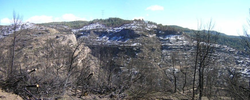 L'Estoviada de Mussarra (Monistrol de Calders, Moianès)